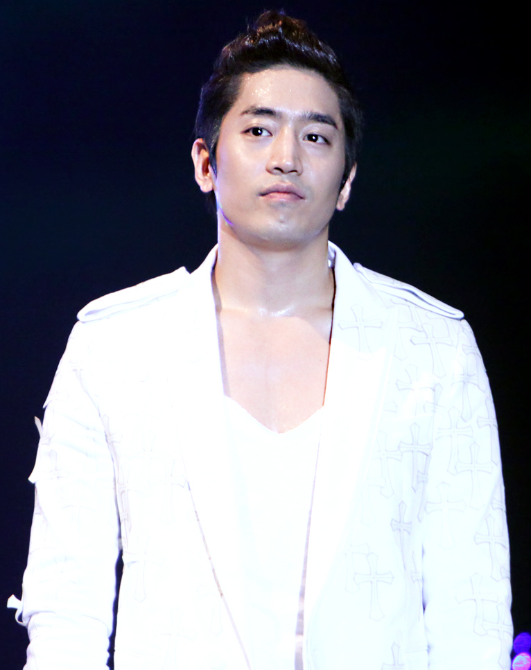 120811 전주 빅4 콘서트